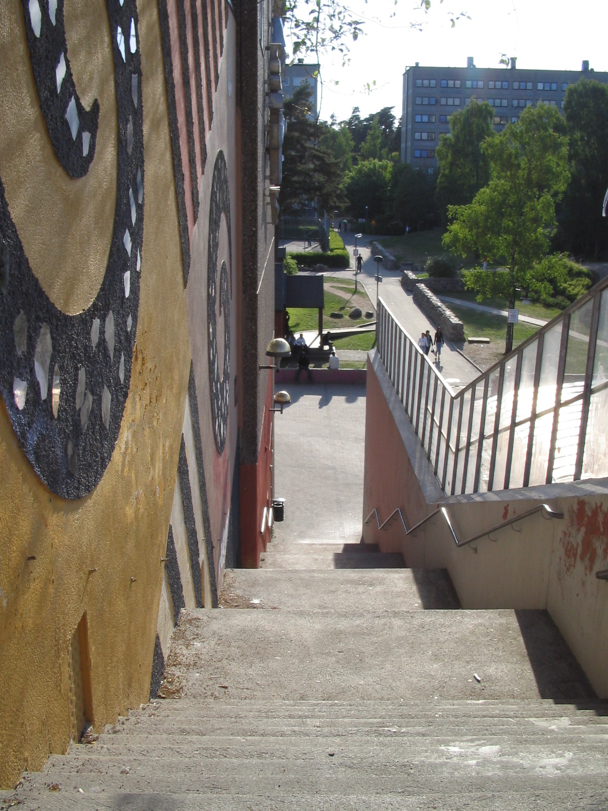 Foto:Philippe